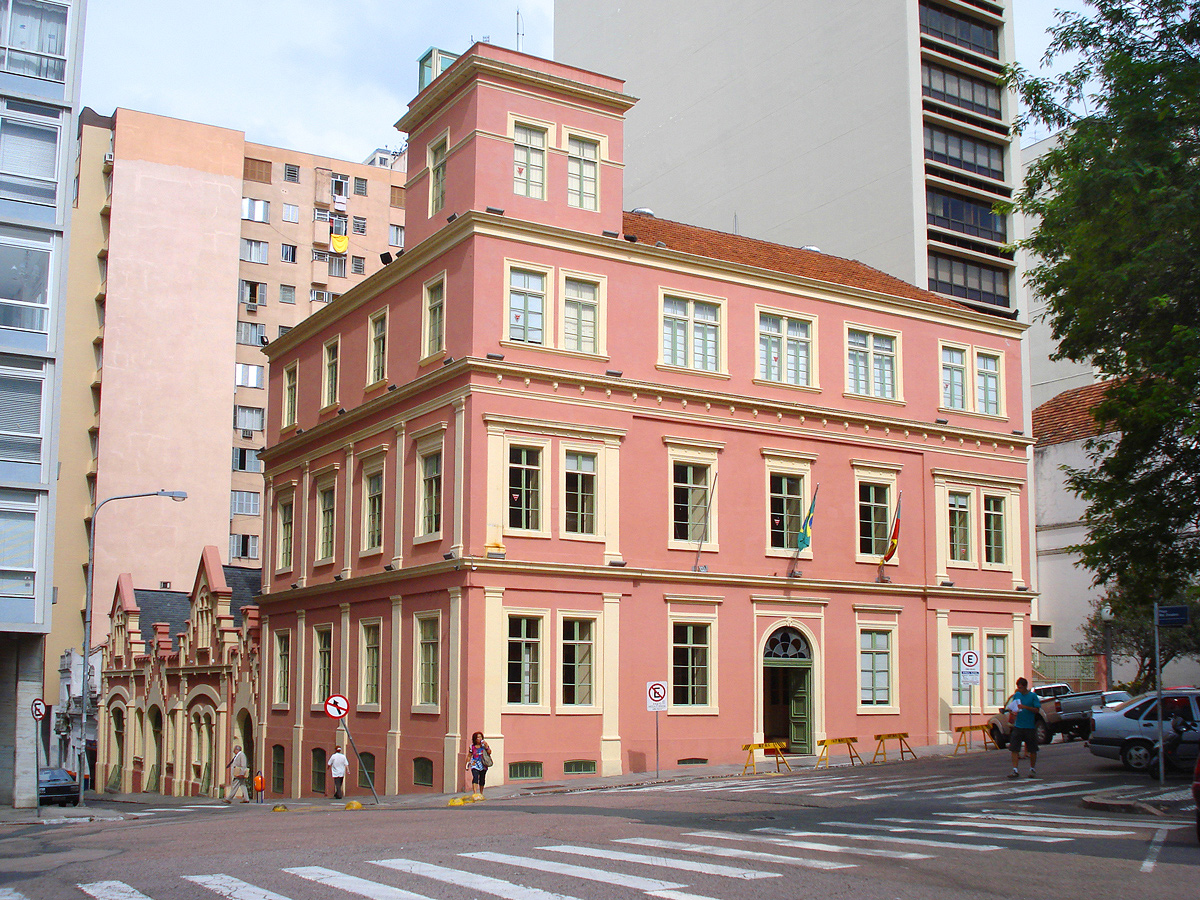 Palácio do Ministério Público, em Porto Alegre, Brasil. Também conhecido como Palácio Provisório e Forte Apache